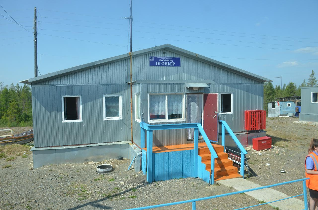 Поездка 5-6 августа 2019 г. по маршруту Якутск - Нерюнгри - Якутск во вновь назначенном поезде № 327 Нижний Бестях - Нерюнгри. Историческое событие - пуск пассажирского движения поездов из центральной Якутии, почти из Якутска.Железнодорожный разъезд Огоньер